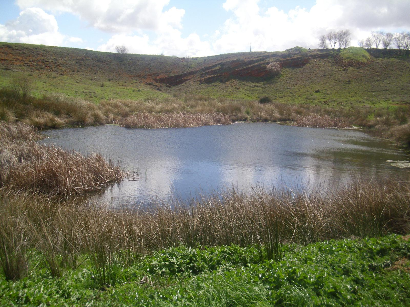 Vista de la laguna cárstica de la Quebrada Puebla de Almenara. Cuenca